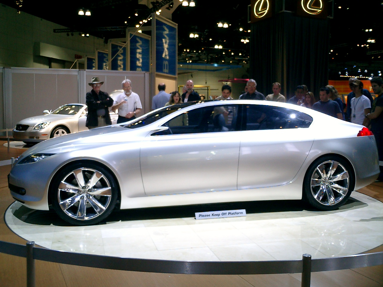 Concept Car